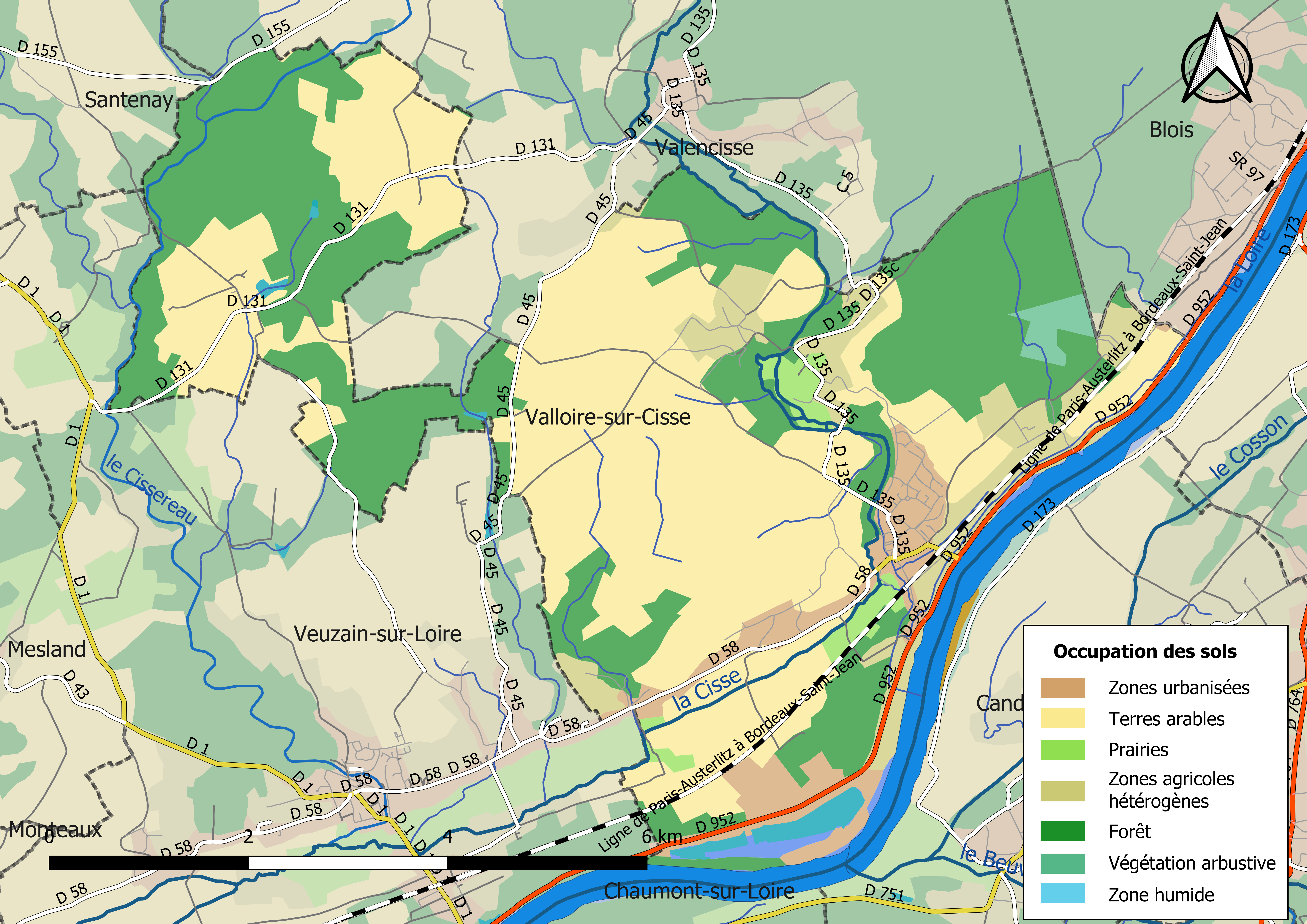 Carte des infrastructures et de l’occupation des sols en 2018 de la commune de Valloire-sur-Cisse (France).